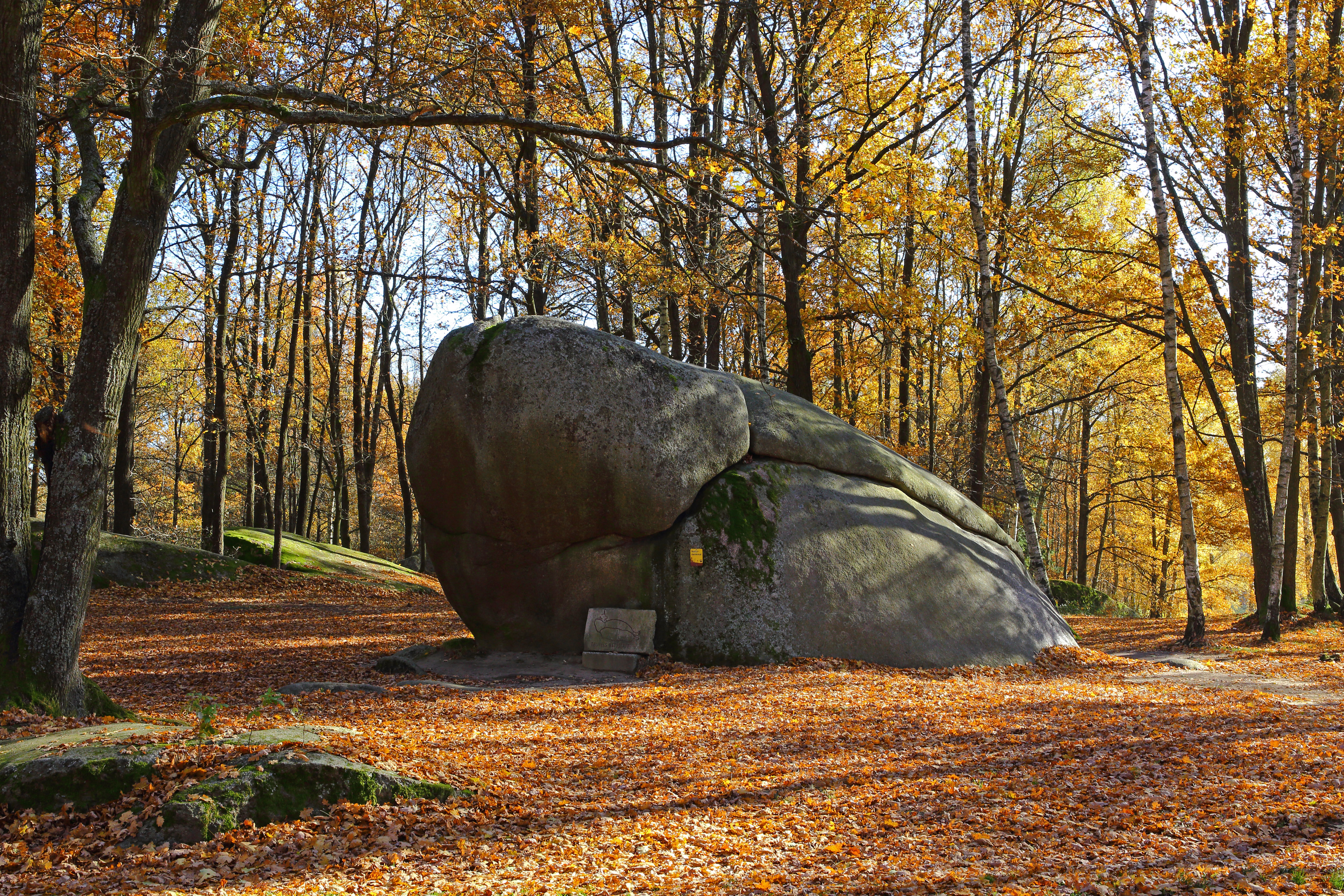 Das Felsgebilde „Teufelsbett“ im Naturpark Blockheide wurde bereits 1930 zum Naturdenkmal erklärt. This media shows the natural monument in Lower Austria with the ID GD-025.